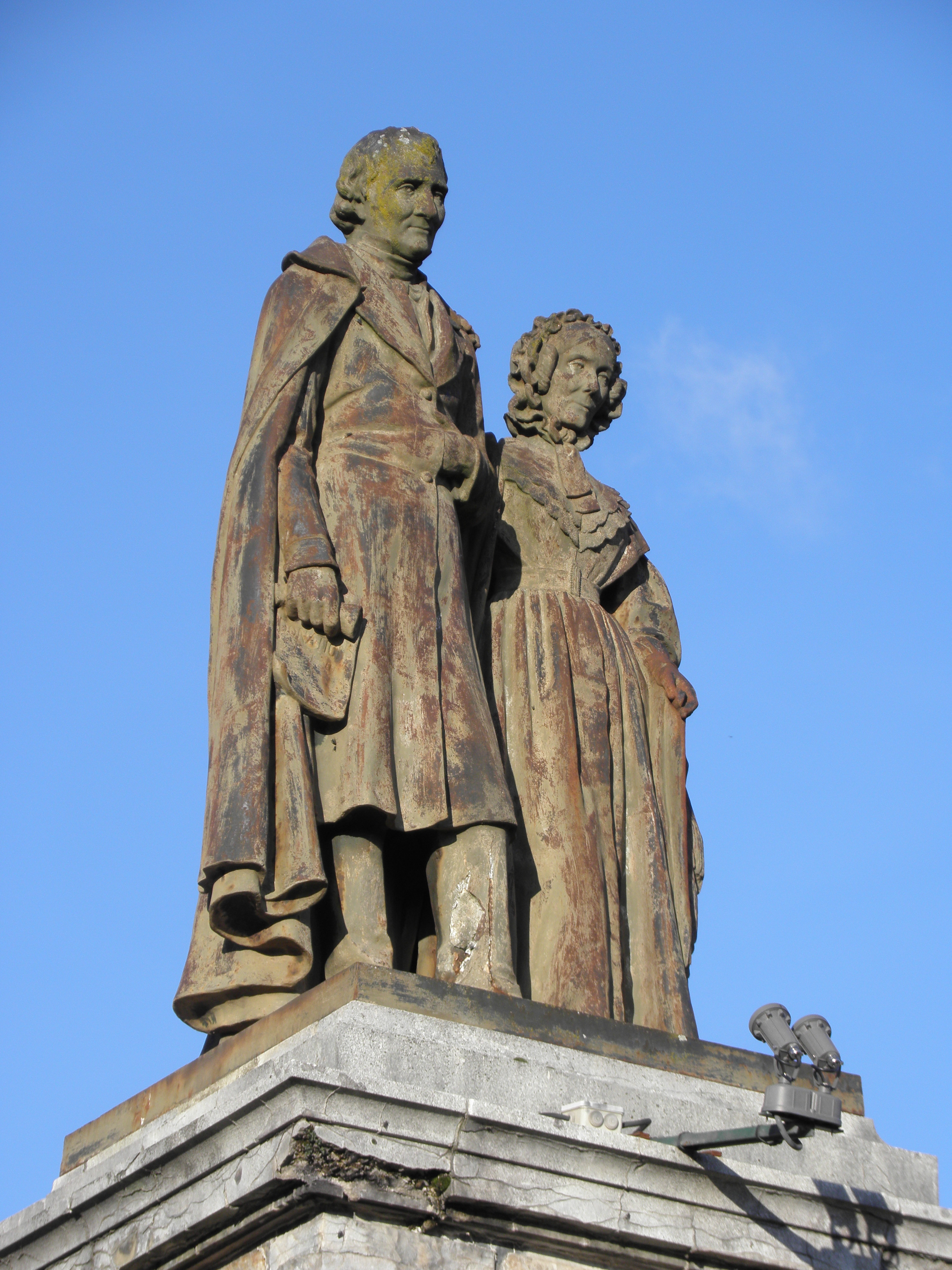 VALAY le monument PETREMAND